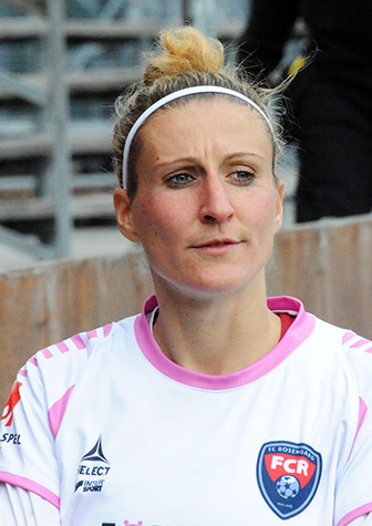 a_119_0913